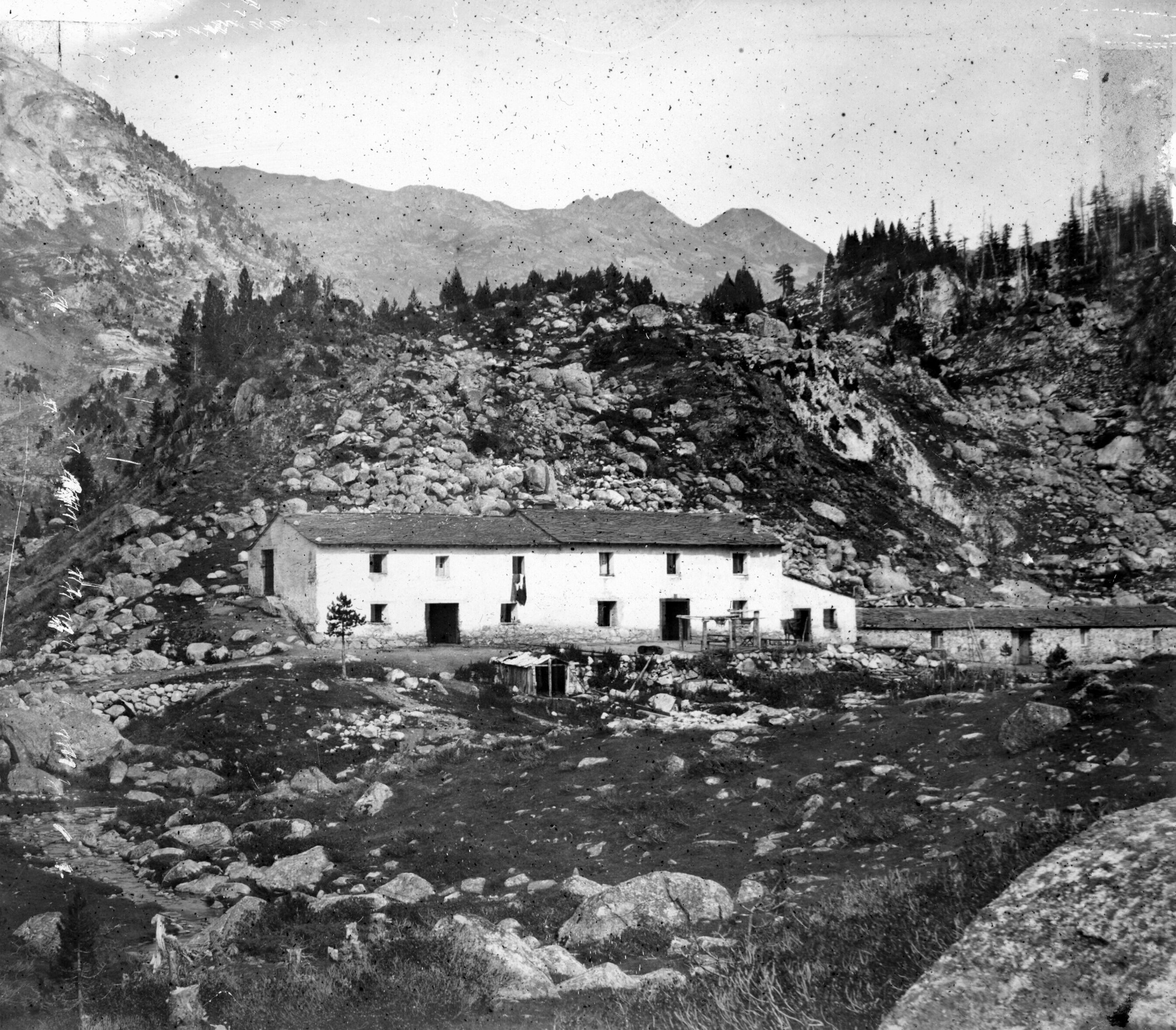 Fonds Trutat - Photographie ancienne Lieu de création : Bagnères-de-Luchon (Haute-Garonne ; canton) Date de création : : 1893 Mot(s)-clé(s) : -- Montagne -- Bâtiment -- Arbre -- Résineux -- Sapin -- Auvent -- Pierre -- Moraine -- Bagnères-de-Luchon (Haute-Garonne ; canton) -- Venasque, Port de (France ; col) -- Hospice de France (Bagnères-de-Luchon) -- Pique (France ; haute-vallée) -- Luchonnais, Massif du (France) -- 19e siècle, 4e quart Bibliographie : Francastel (Philippe). - Luchon et ses vallées. -Toulouse : Privat, 1999. p 127; 24 cm Bibliothèque de Toulouse. Domaine public